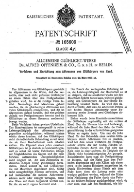 Auszug aus dem Patent Nr. 165609 des Berliner Chemikers und Unternehmers Dr. Alfred Oppenheim für ein Verfahren und Einrichtung zum Abbrennen von Glühkörpern von Hand